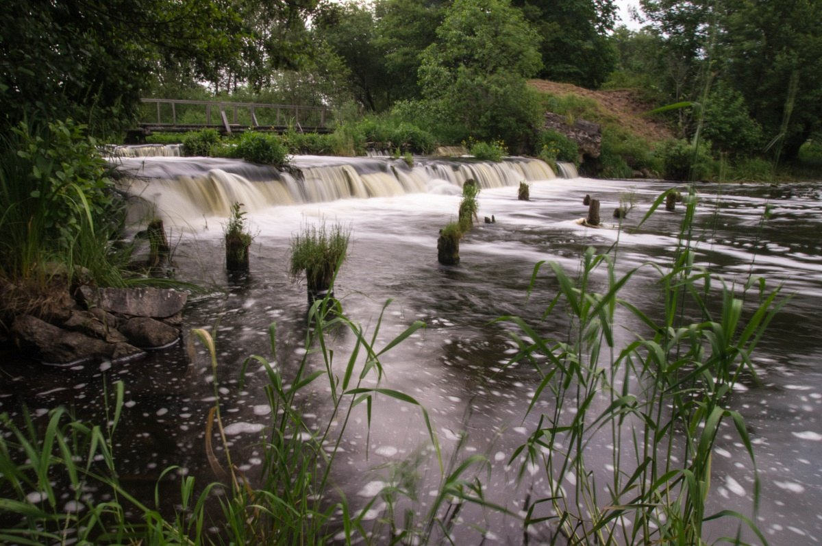 Узла. Млын